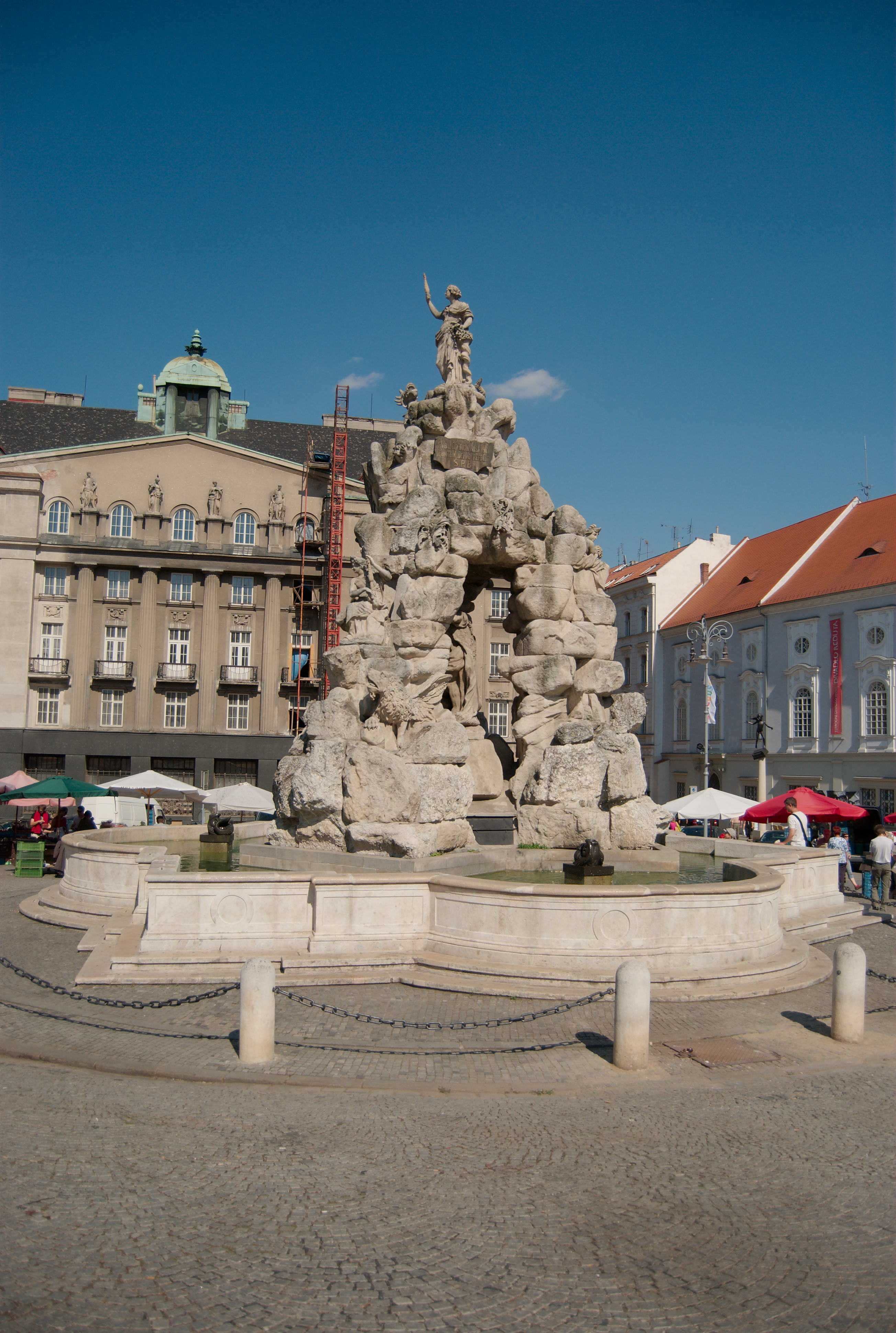 Město Brno - kašna Parnas na Zelném trhu od západu